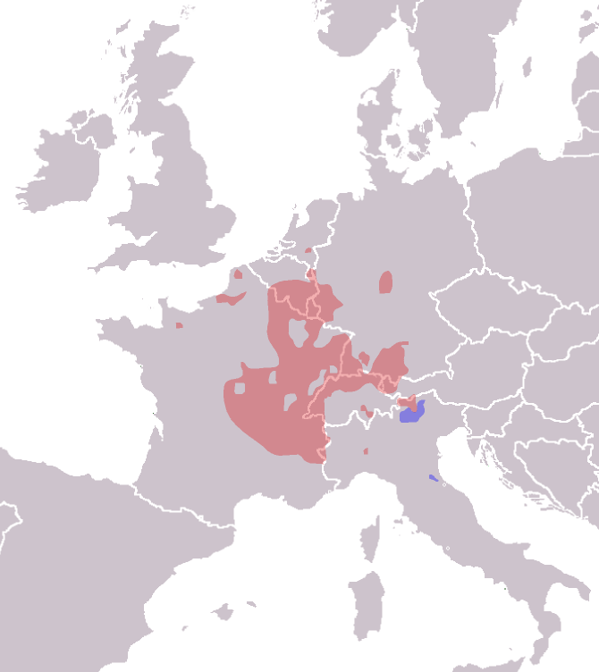 Distribution of the folk custom of lighting fires on Sunday in Lent and March 1. Verbreitungskarte der Funkenfeuer am 1. Fastensonntag und der Feuer am 1. März. Based on: Institut für Angewandte Geodäsie: Die Termine der Jahresfeuer in Europa 1:4000.000, 1:4 000 000, Frankfurt/M., 1979 (Ethnologischer Atlas Europas und seiner Nachbarländer)